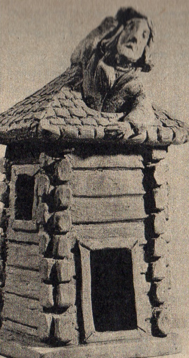 Władysława Prucnal, Mikołaj Kopernik, 1982r.